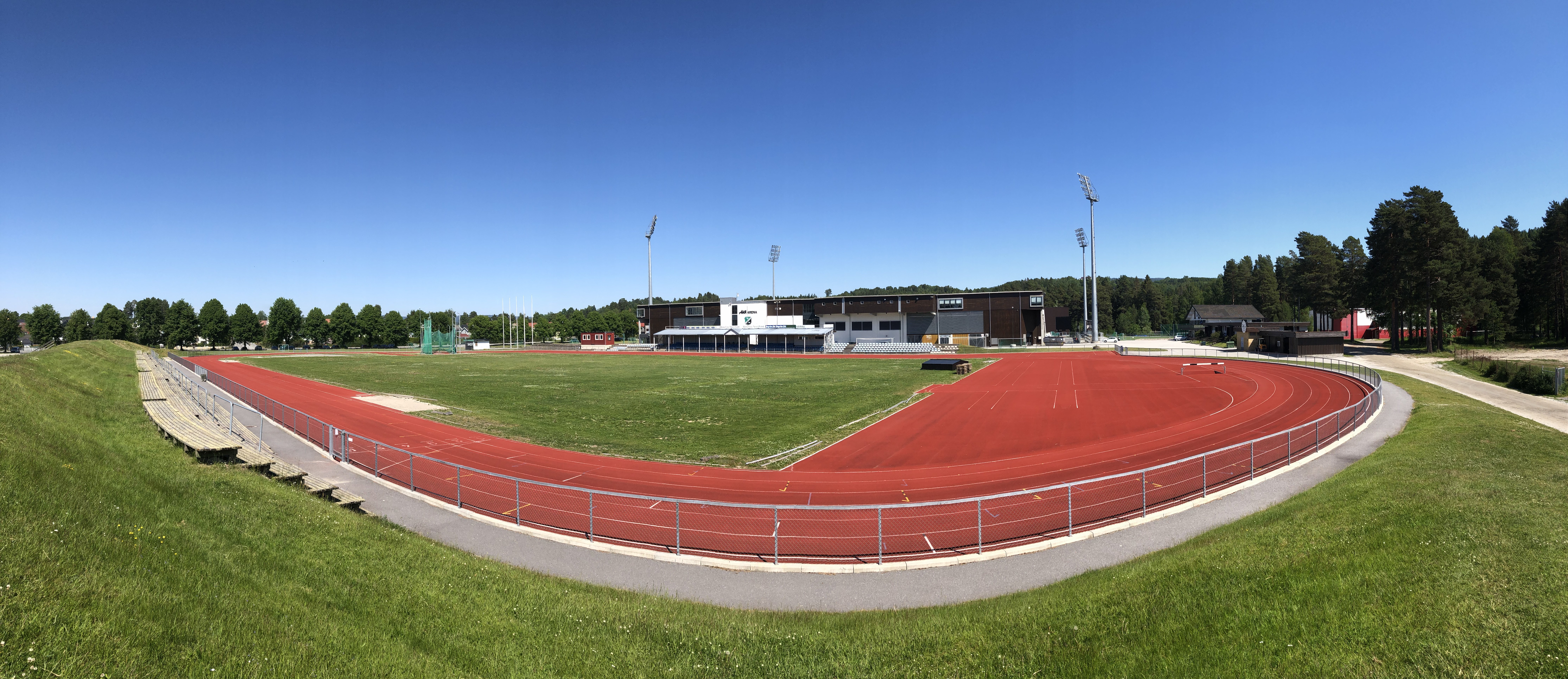 Hønefoss idrettspark, panorama, 2020